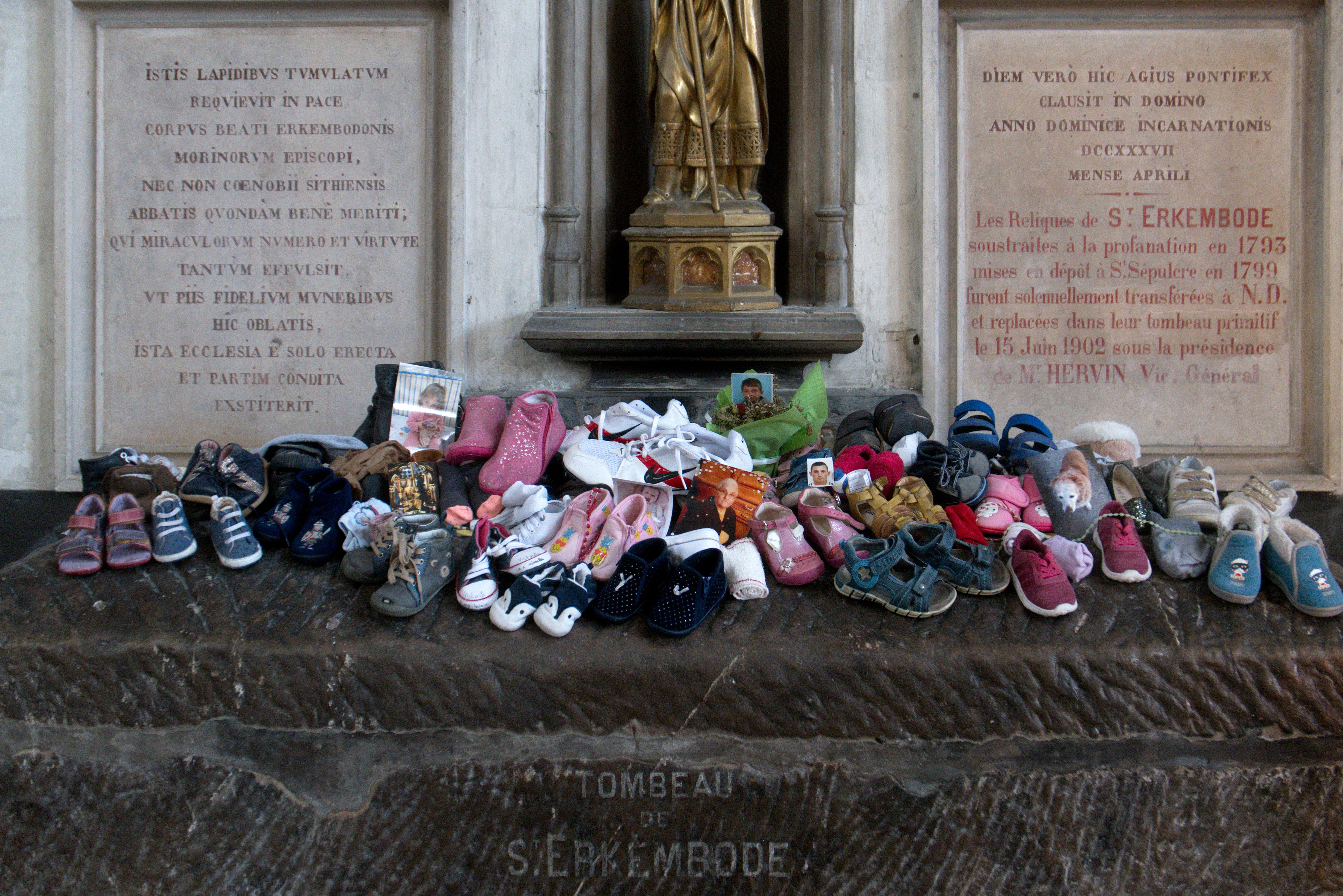 Foto gemaakt in de katherdraal van Sint Omaar